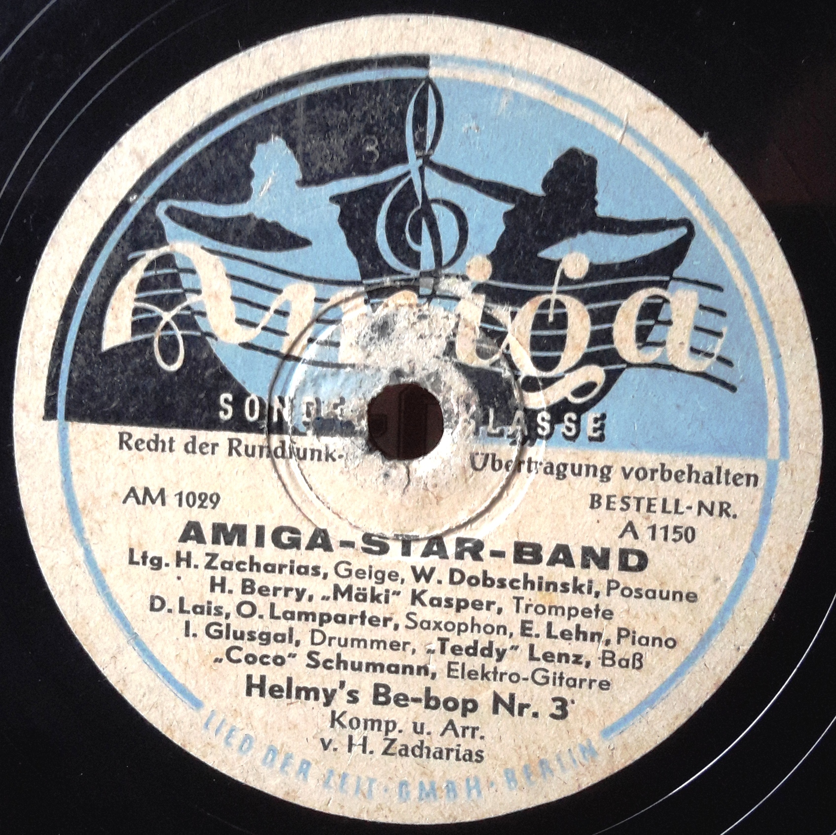 Label der Schallplatten-Marke Amiga, Aufnahme der "Amiga-Star-Band", Titel ist von Helmut Zacharias